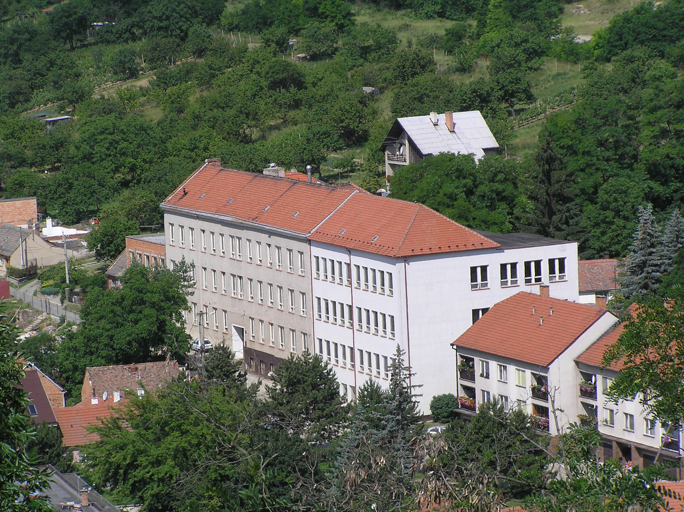 ZŠ Dolní Kounice